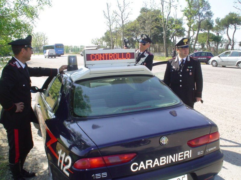 Due appuntati del Nucleo radiomobile ed il capitano comandante della Compagnia carabinieri di Fano (PU) durante un controllo sul territorio.